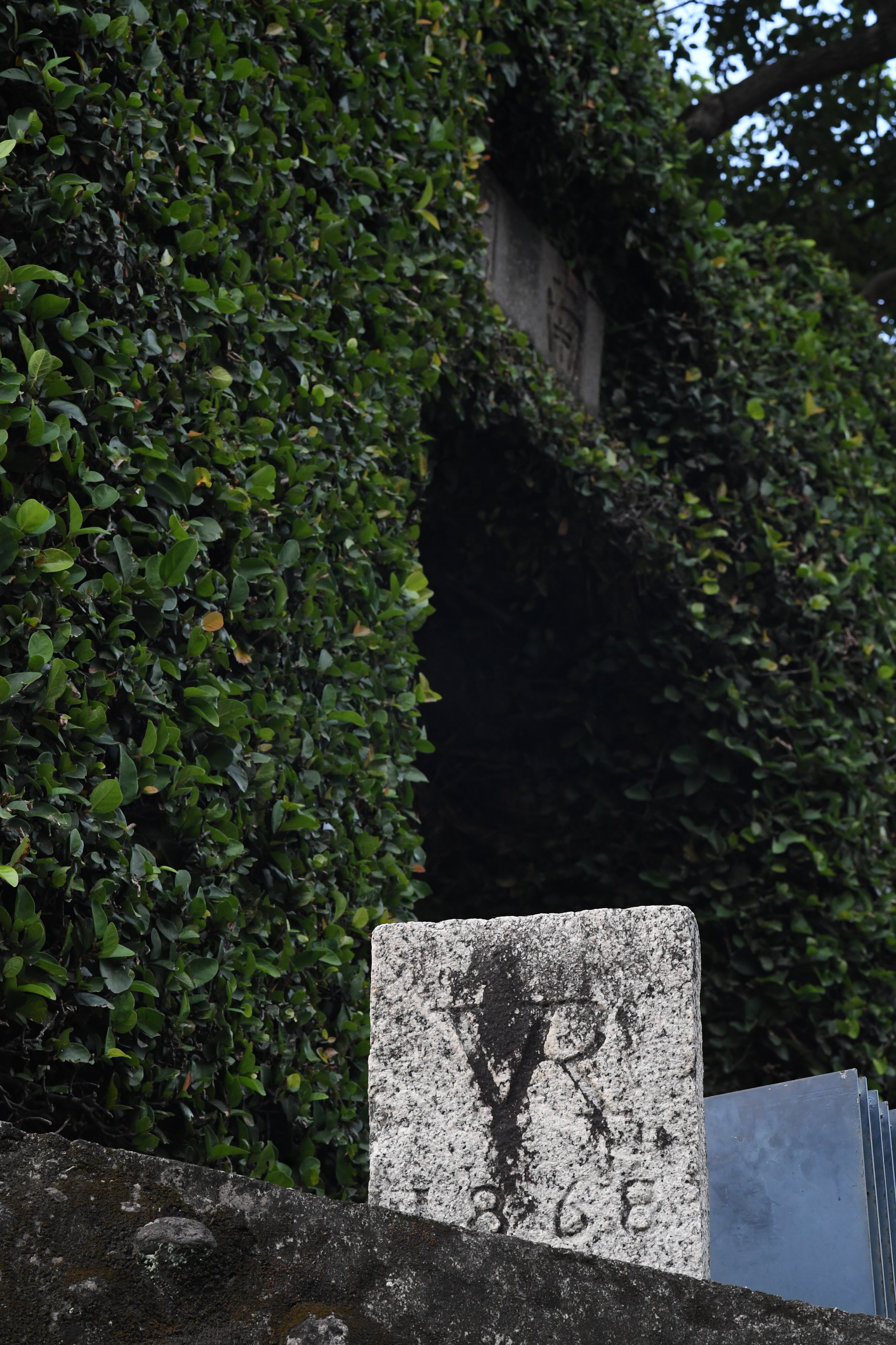 中文（台灣）: 1724年清領時期建四座城門作為兵營現僅存南門。 1868年英國將領事館設在紅毛城, VR1868界碑和工整楷書字跡南門見證這段三百多年歷史。